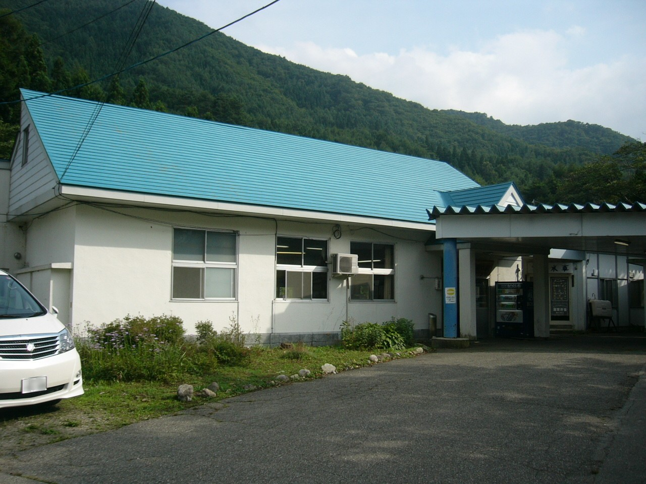 Aizukogenozeguchi Station